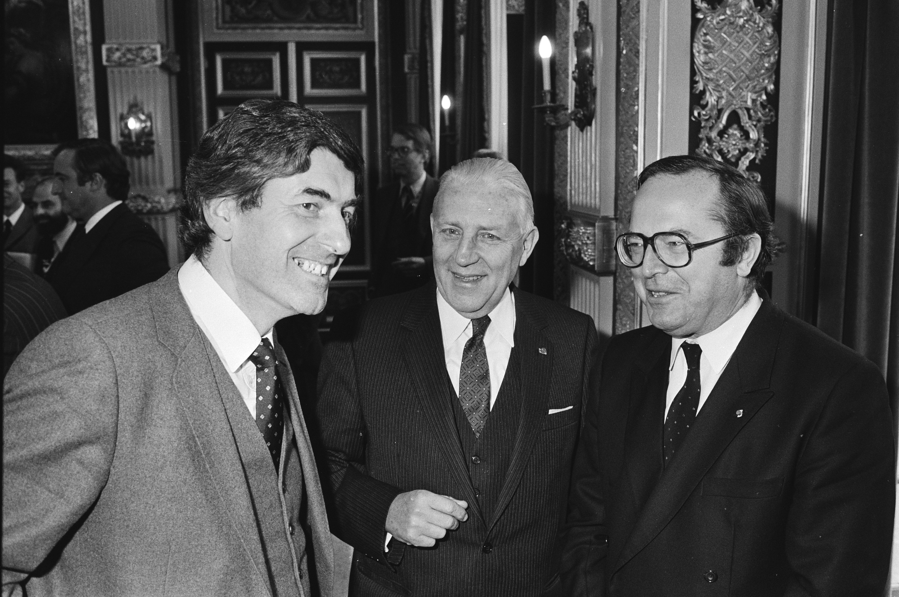 Collectie / Archief : Fotocollectie Anefo Reportage / Serie : Conferentie van premiers en ministers van Buitenlandse Zaken van de Beneluxlanden Beschrijving : V.l.n.r. premiers Lubbers, Pierre Werner (Luxemburg) en Wilfried Martens (België) Datum : 10 november 1982 Trefwoorden : conferenties, groepsportretten, premiers Persoonsnaam : Lubbers, Ruud, Martens, Wilfried, Werner, Pierre Fotograaf : Antonisse, Marcel / Anefo Auteursrechthebbende : Nationaal Archief Materiaalsoort : Negatief (zwart/wit) Nummer archiefinventaris : bekijk toegang 2.24.01.05 Bestanddeelnummer : 932-3952